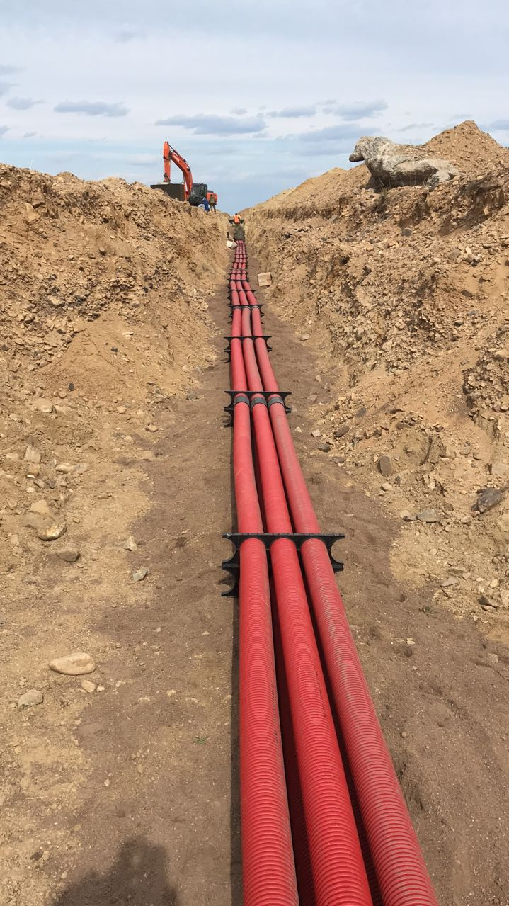 Stacking of a connected pipeline for transportation of oil products